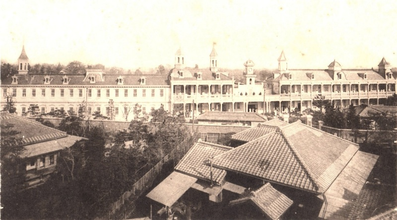 東京府東京市赤坂区青山南町五丁目に存在した、青山脳病院。